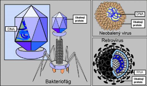 Struktura virových částic